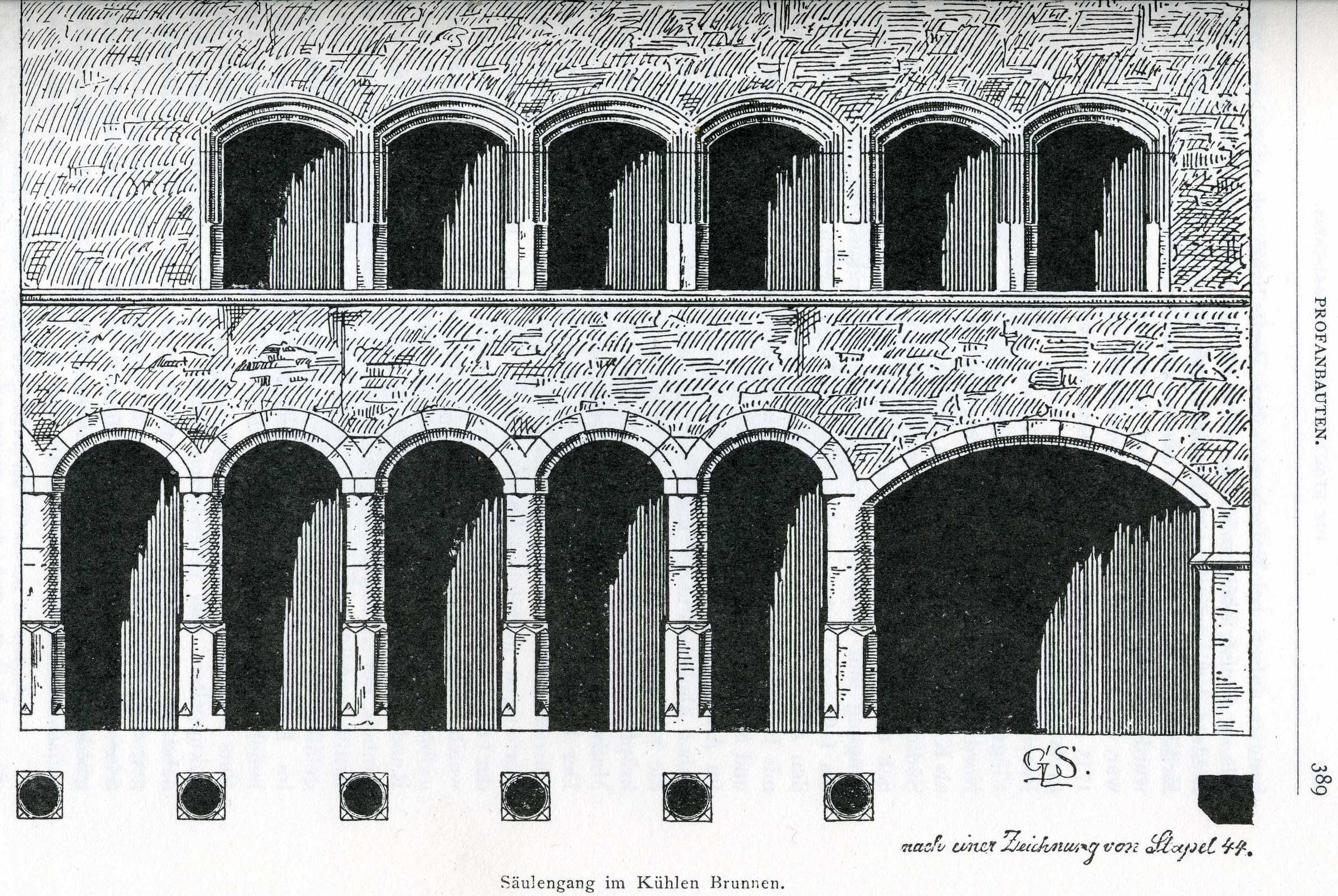 Säulengang im Kühlen Brunnen, nach einer Zeichnung von August Stapel